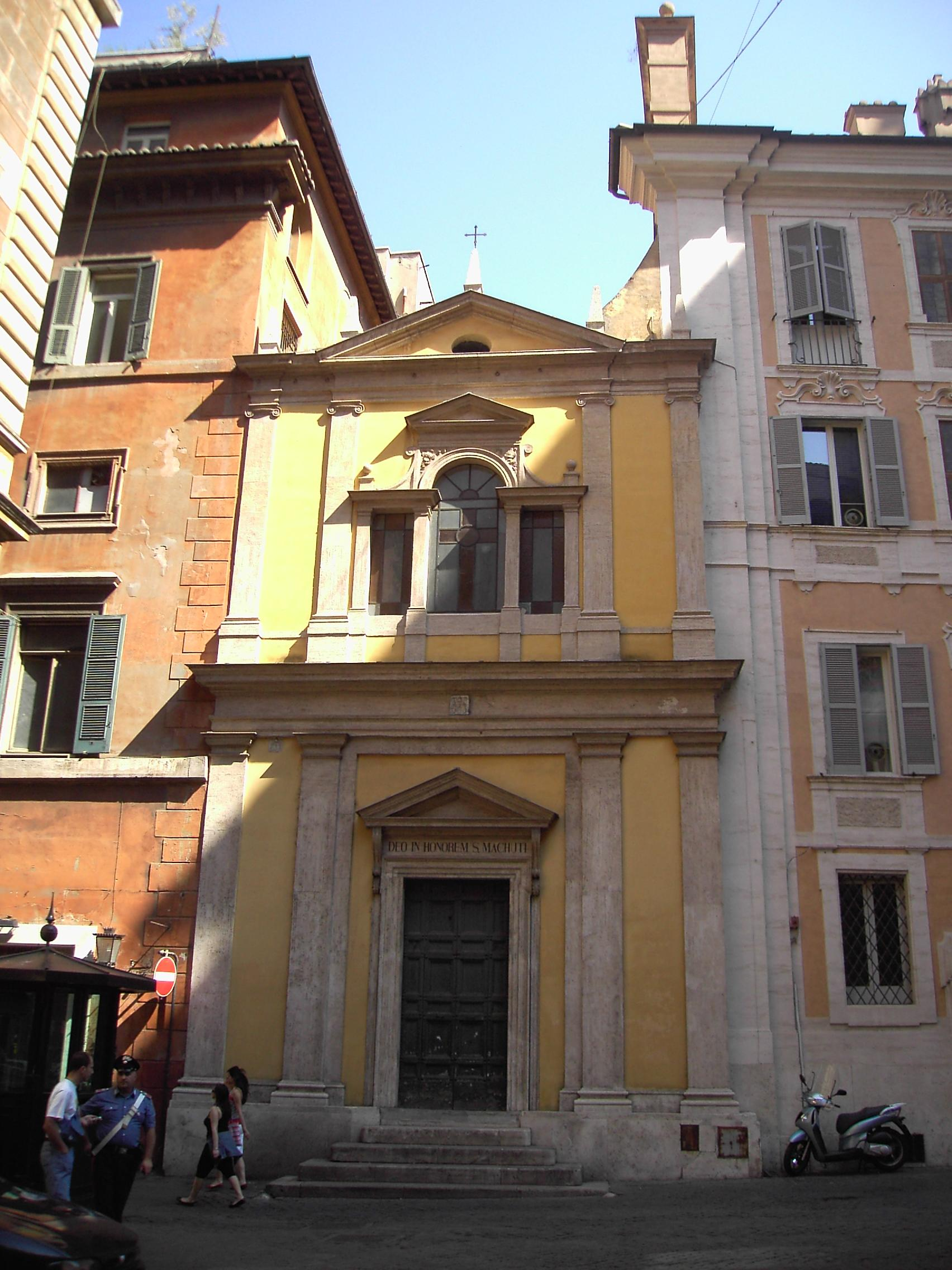 Roma, san Macuto (r. Colonna)